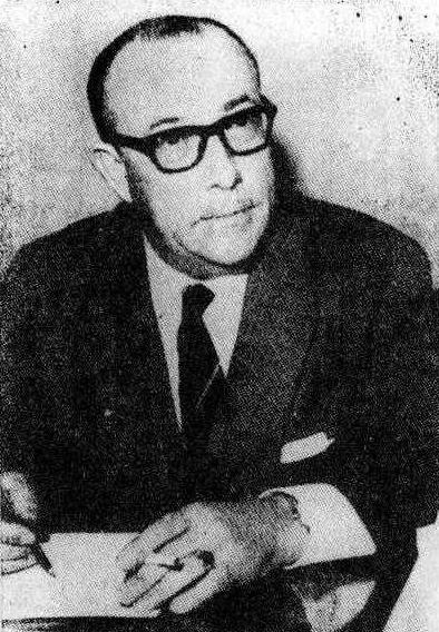 Aldo Tessio, gobernador de Santa Fe entre 1963 y 1966